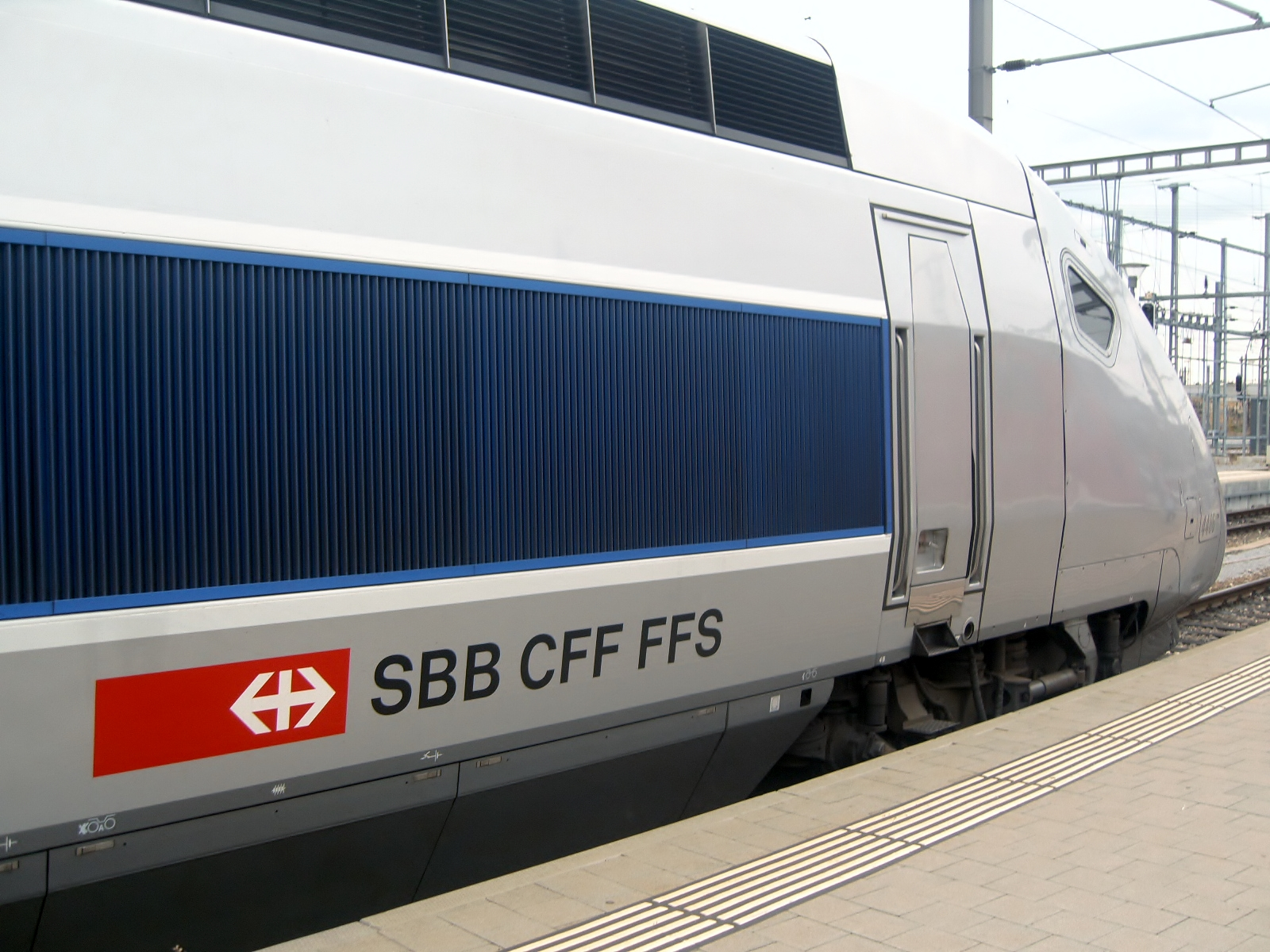 TGV 4406 "Basel" in Bahnhof Basel SBB.